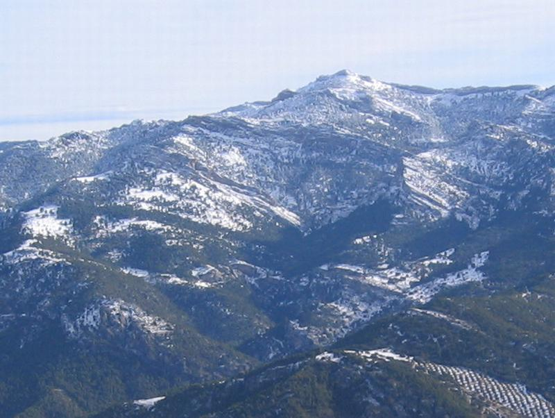 Aguilón del Loco o Villalta 1956 m. -- Juan Diego Cano Cavanillas